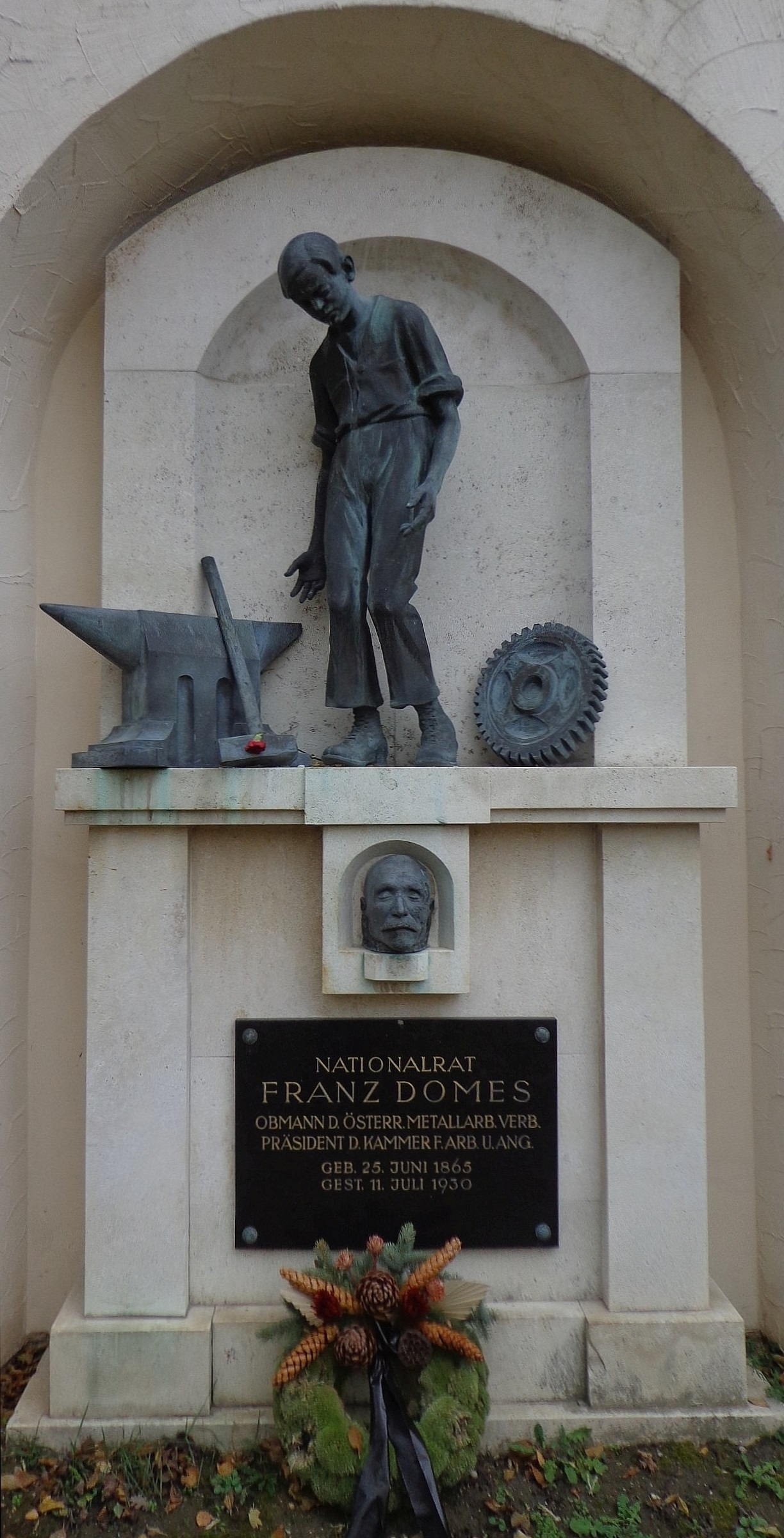 Feuerhalle Simmering - Abteilung ML (Umfassungsmauer): Urnengrab von Franz Domes